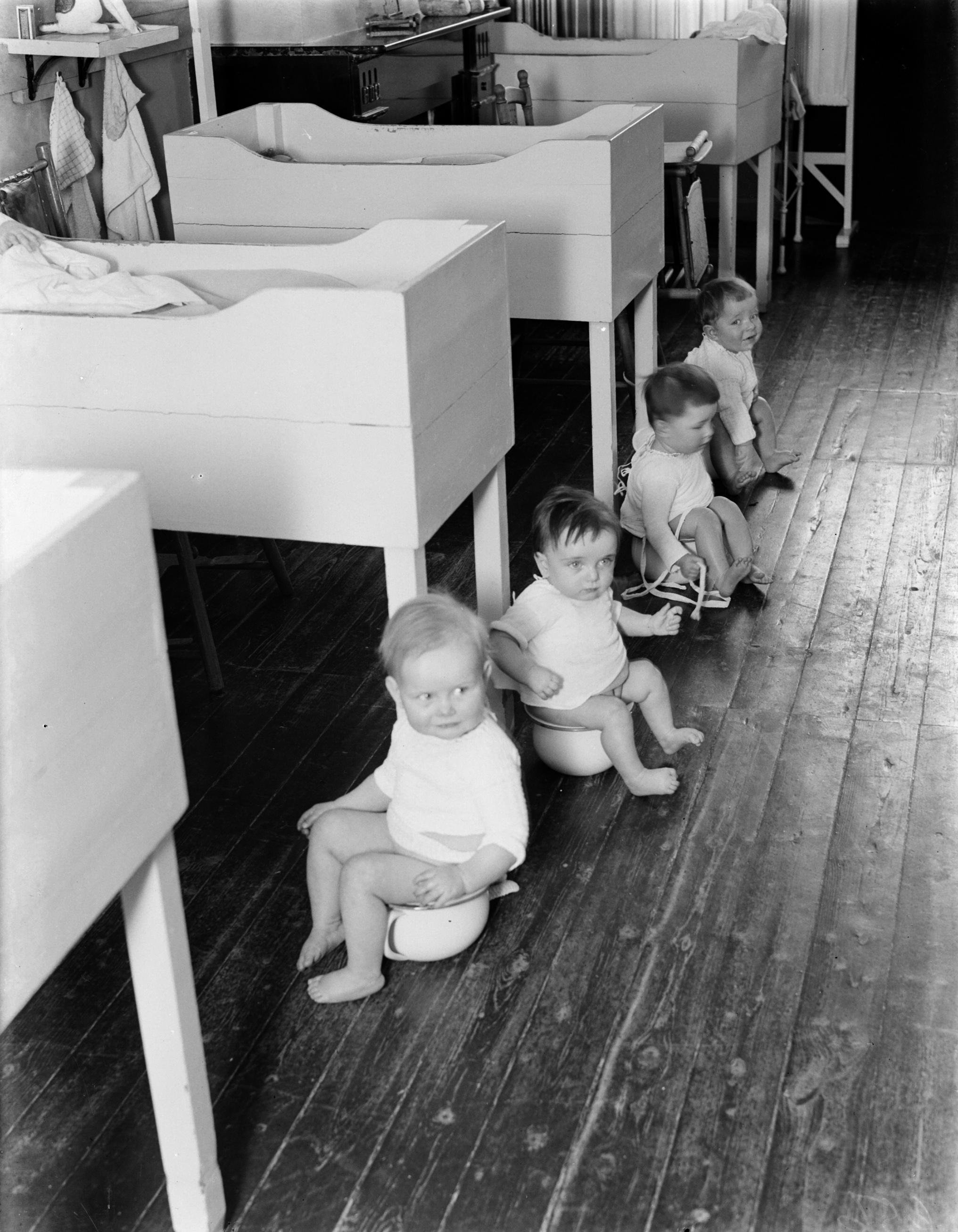 Collectie / Archief : Fotocollectie Van de Poll Reportage / Serie : Tehuis Annette Beschrijving : Peuters in het tehuis zitten met zijn allen op de po Annotatie : Tehuis Annette, genoemd naar Annette Versluys-Poelman werd in 1905 opgericht ten behoeve van ongehuwde moeders en hun kinderen. Het was vanaf 1916 gevestigd aan de Alberdingk Thijmstraat 36-40 in Amsterdam Datum : 1932 Locatie : Amsterdam, Noord-Holland Trefwoorden : bedden, kinderen, tehuizen Fotograaf : Poll, Willem van de, [onbekend] Auteursrechthebbende : Nationaal Archief Materiaalsoort : Glasnegatief Nummer archiefinventaris : bekijk toegang 2.24.14.02 Bestanddeelnummer : 252-0385